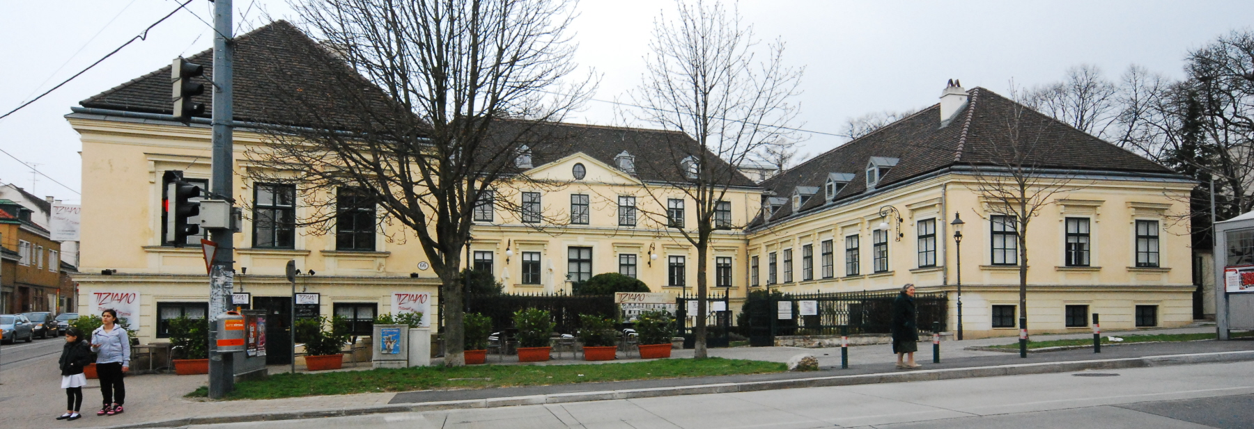 denkmalgeschützter Gall-Hof in der Hetzendorfer Straße # Schönbrunner Allee in Wien-Meidling